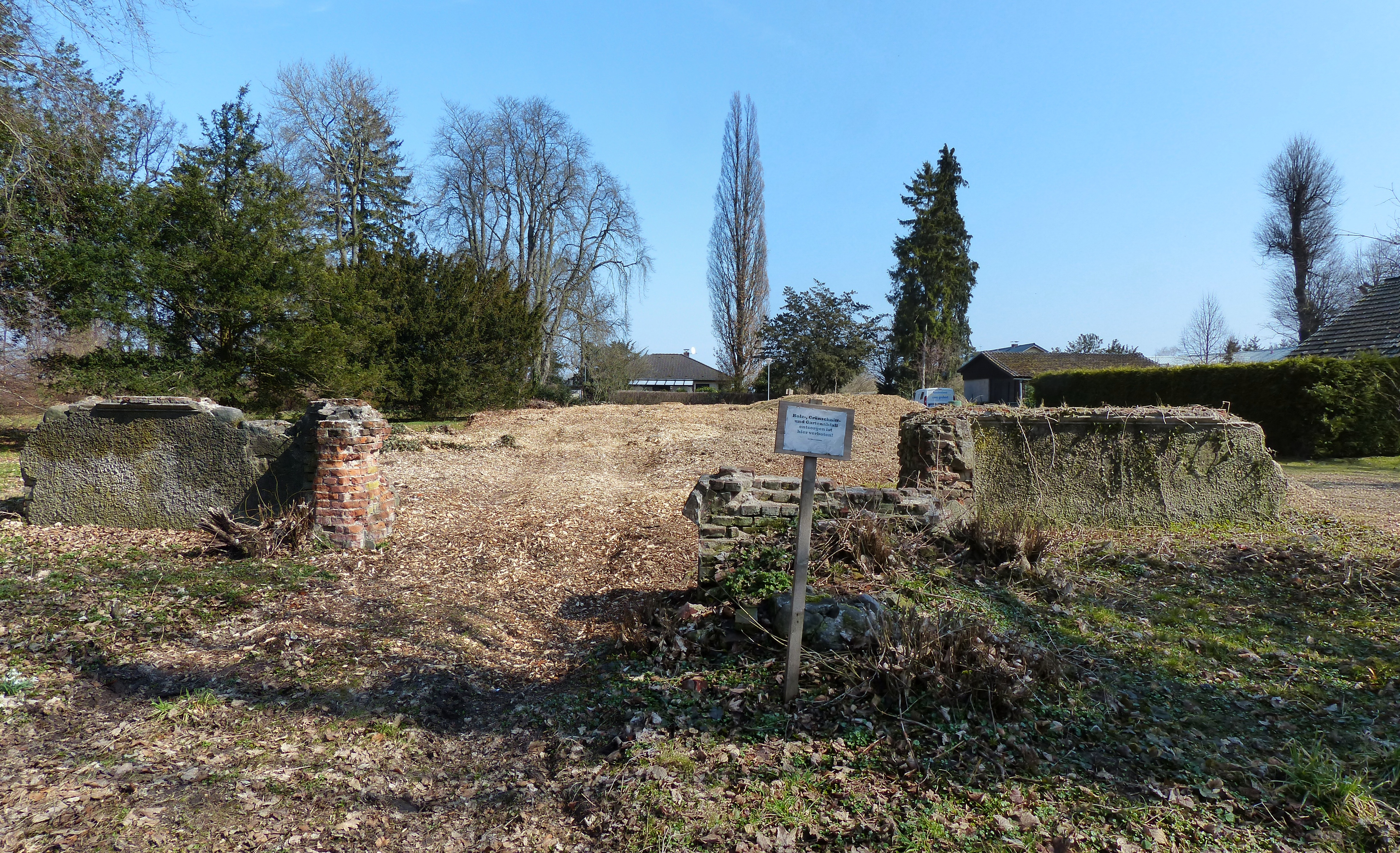 Landschaftspark Behrenhoff, Ruine und Kellerreste des Gutshauses Behrenhoff, Ansicht von Südwesten